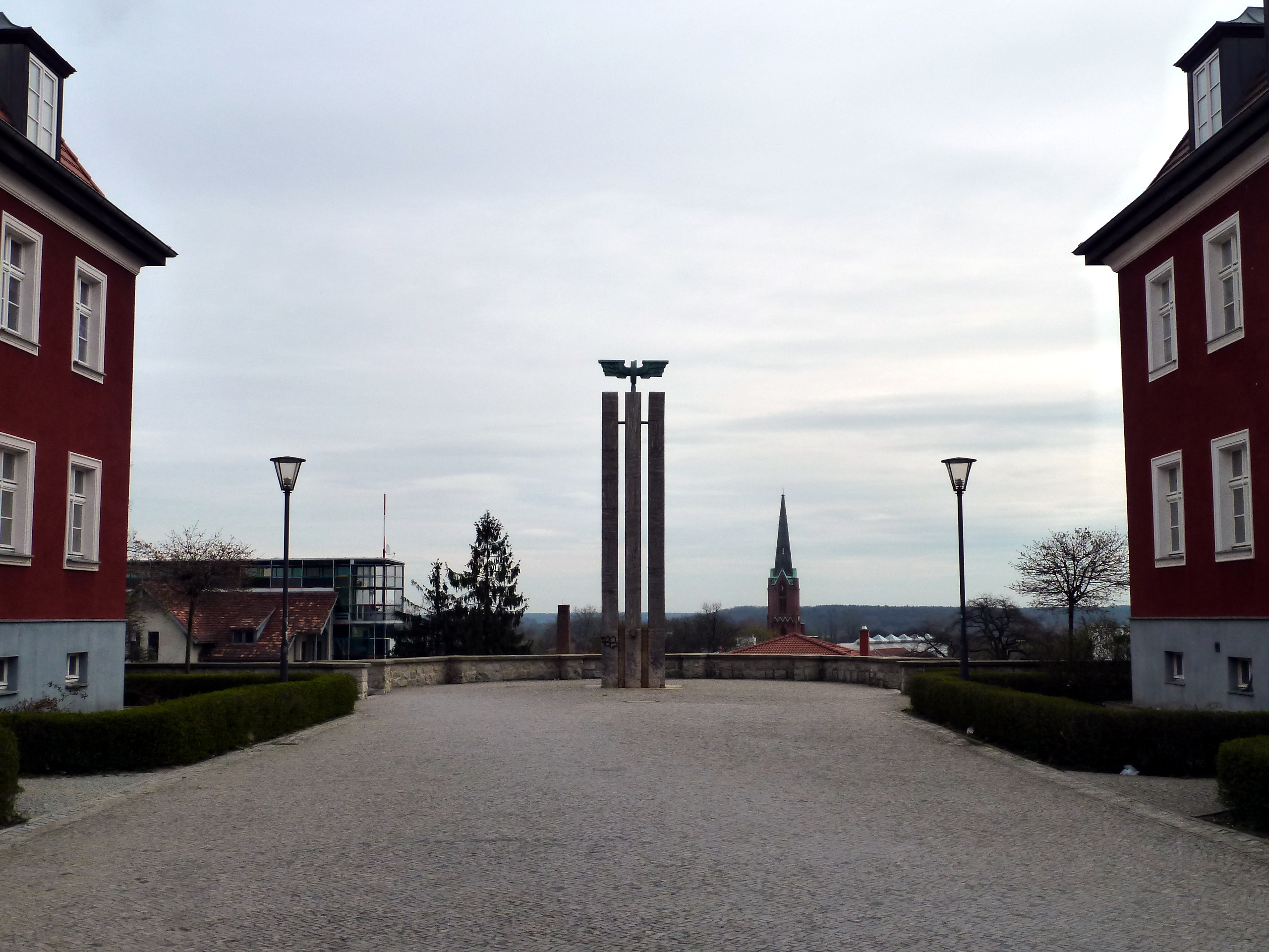 Frankfurt (Oder), denkmalgeschützte Siedlung Kiliansberg mit Denkmal für gefallene Eisenbahner